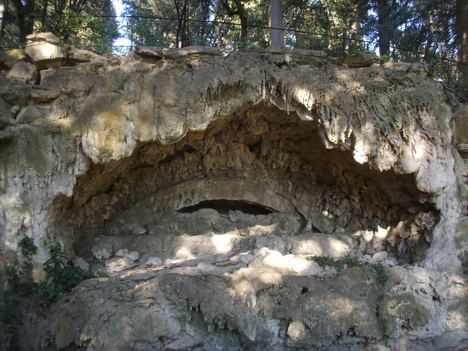 Villa paolina di sesto 04 grotta